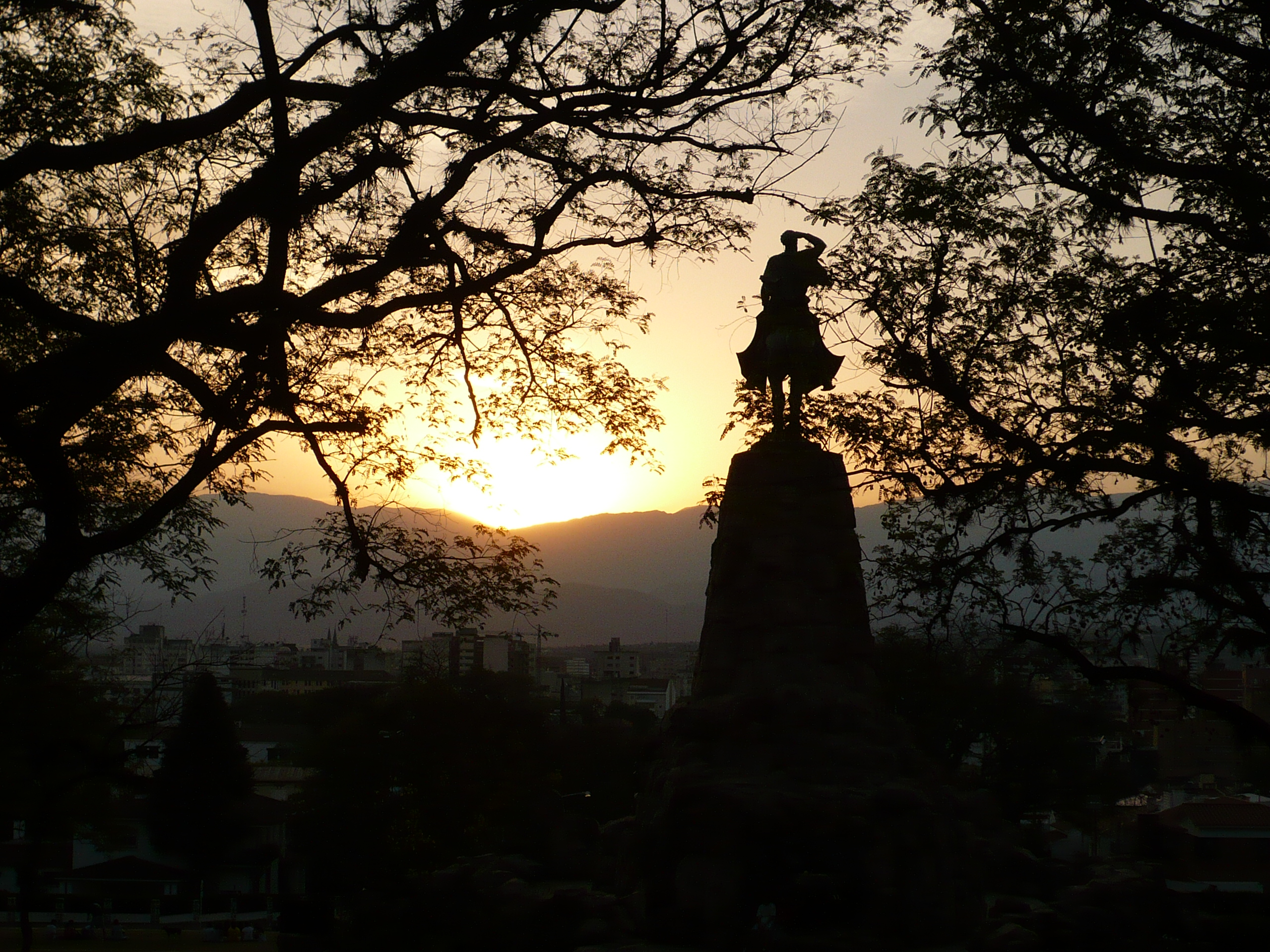 Atardecer en el monumento a Martín Miguel de Güemes, en Salta